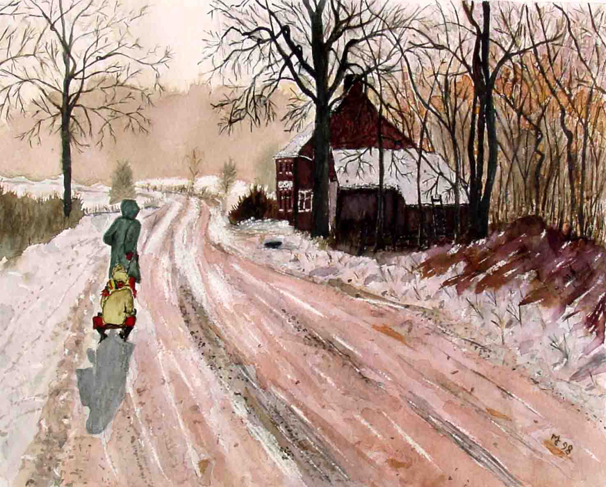 Maisières (Hainaut) - Belgique, l'estaminet "le relais des voituriers" sis chaussée de Brunehault.